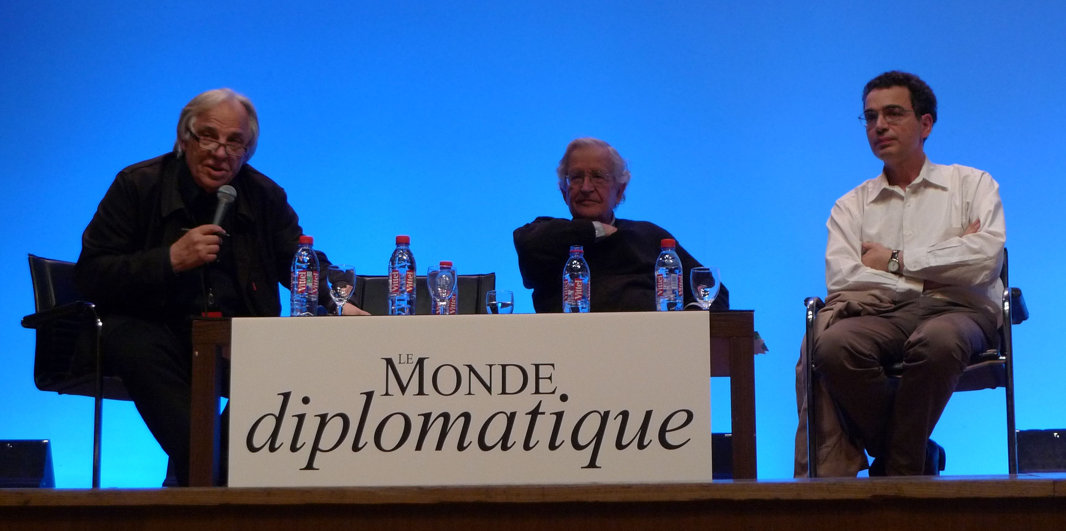 Daniel Mermet, Noam Chomsky et Serge Halimi à Paris le 29 mai 2010 à l'initiative du Monde diplomatique.